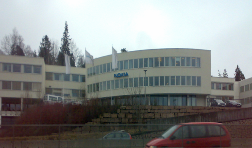 Nokia, Norway